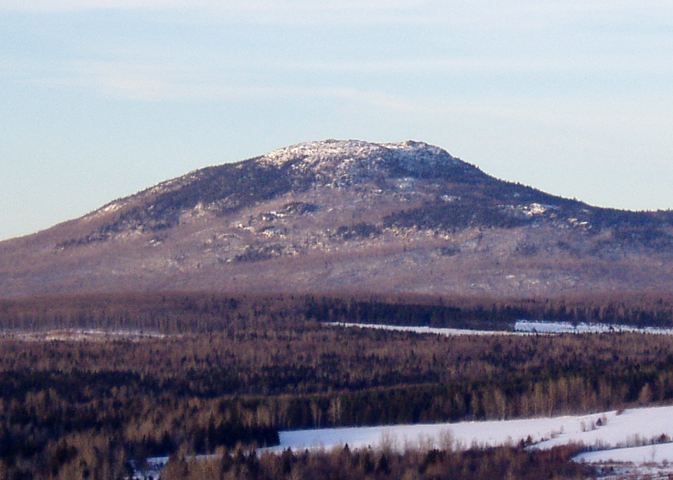 Mont Ham, Saint-Joseph de Ham-Sud dans les Cantons de l'Est, Québec, Canada